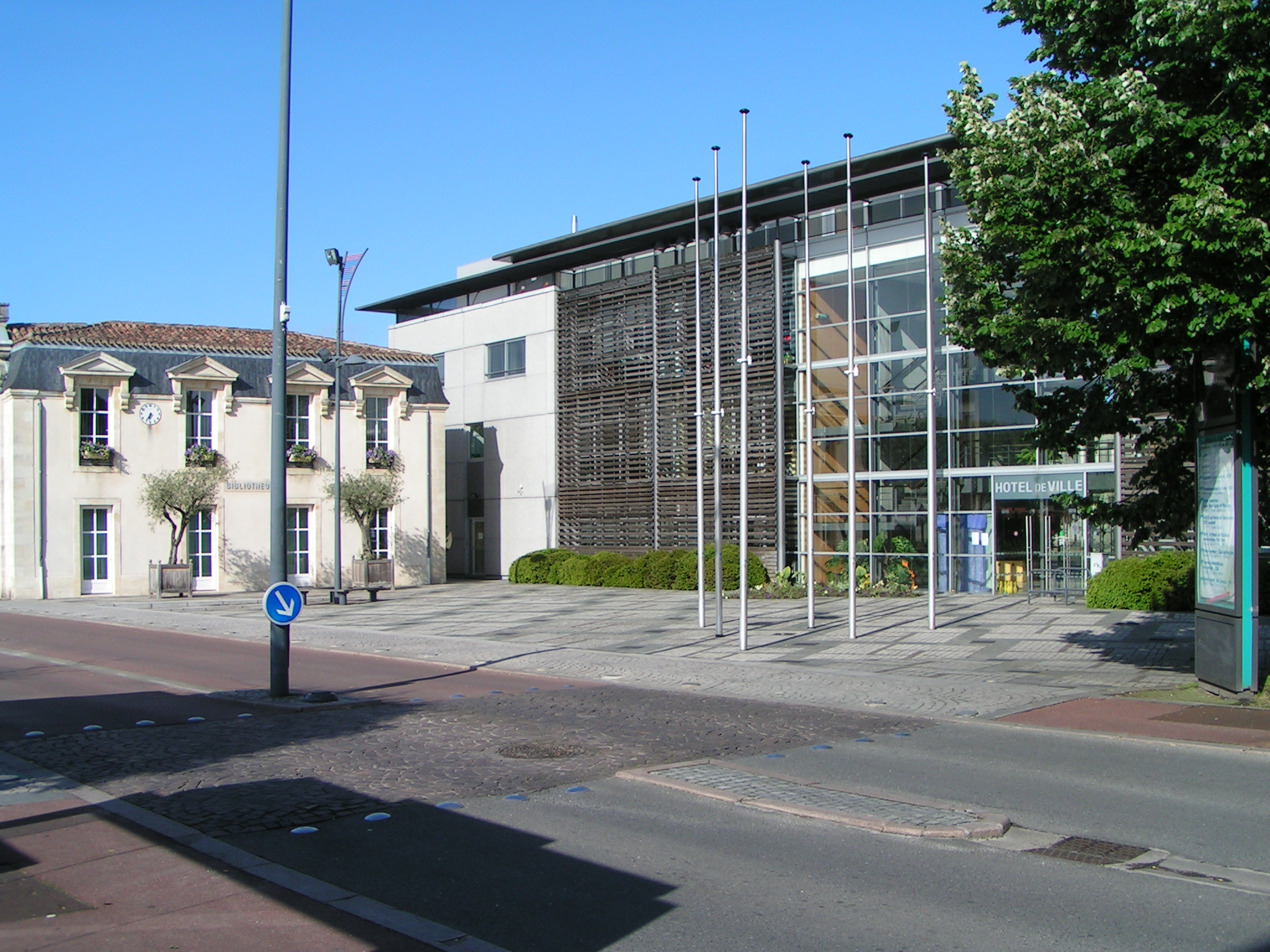 Mairie de Bruges Gironde